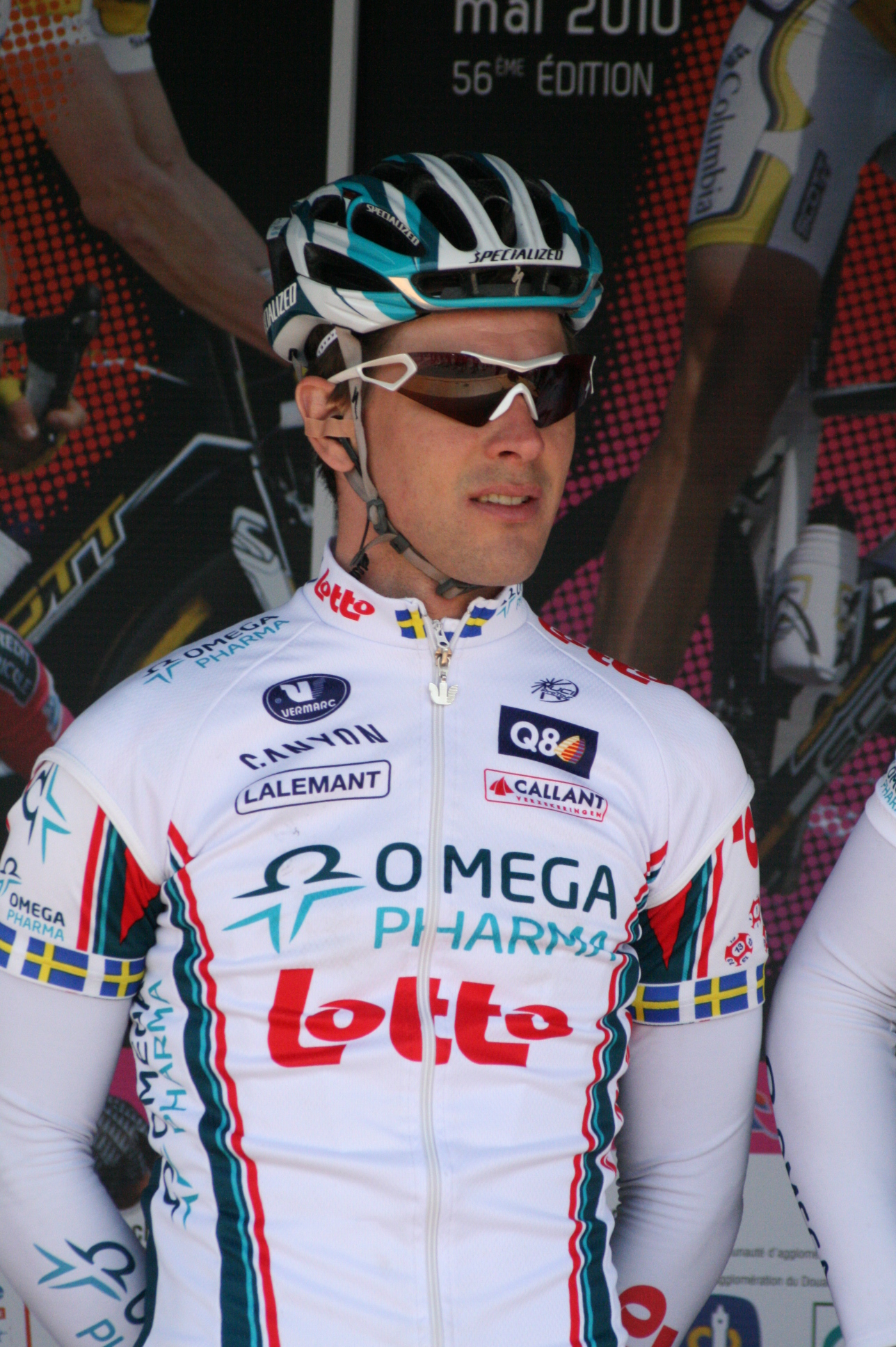 Jonas Ljungblad, lors de la présentation des équipes des 4 jours de Dunkerque 2010